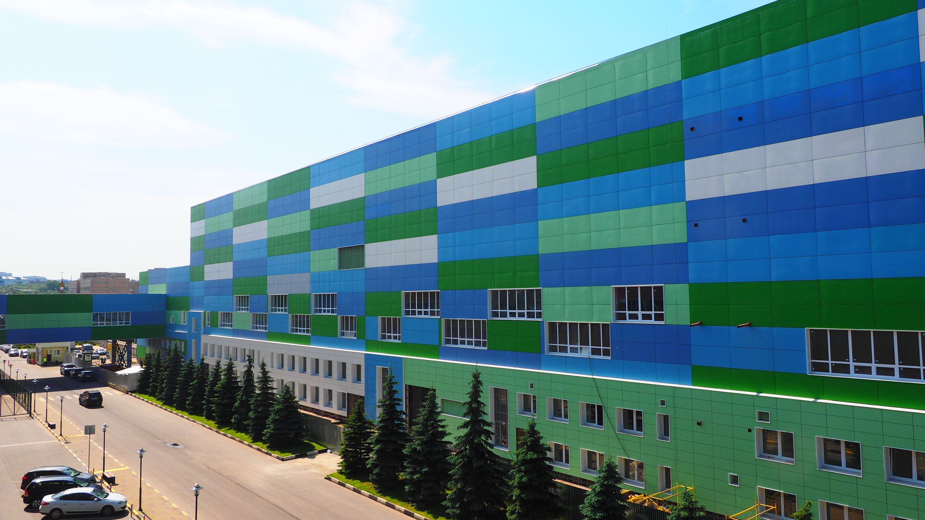 Корпус 24 Технополиса «Москва» (на реконструкции).